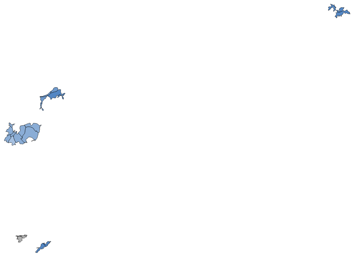 中文（台灣）: 顏色對照表